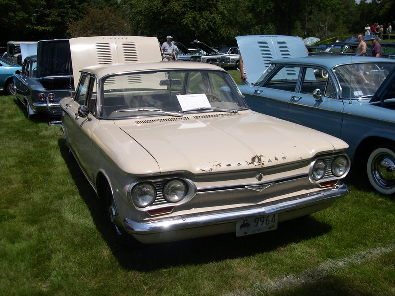 1964 Chevrolet Corvair